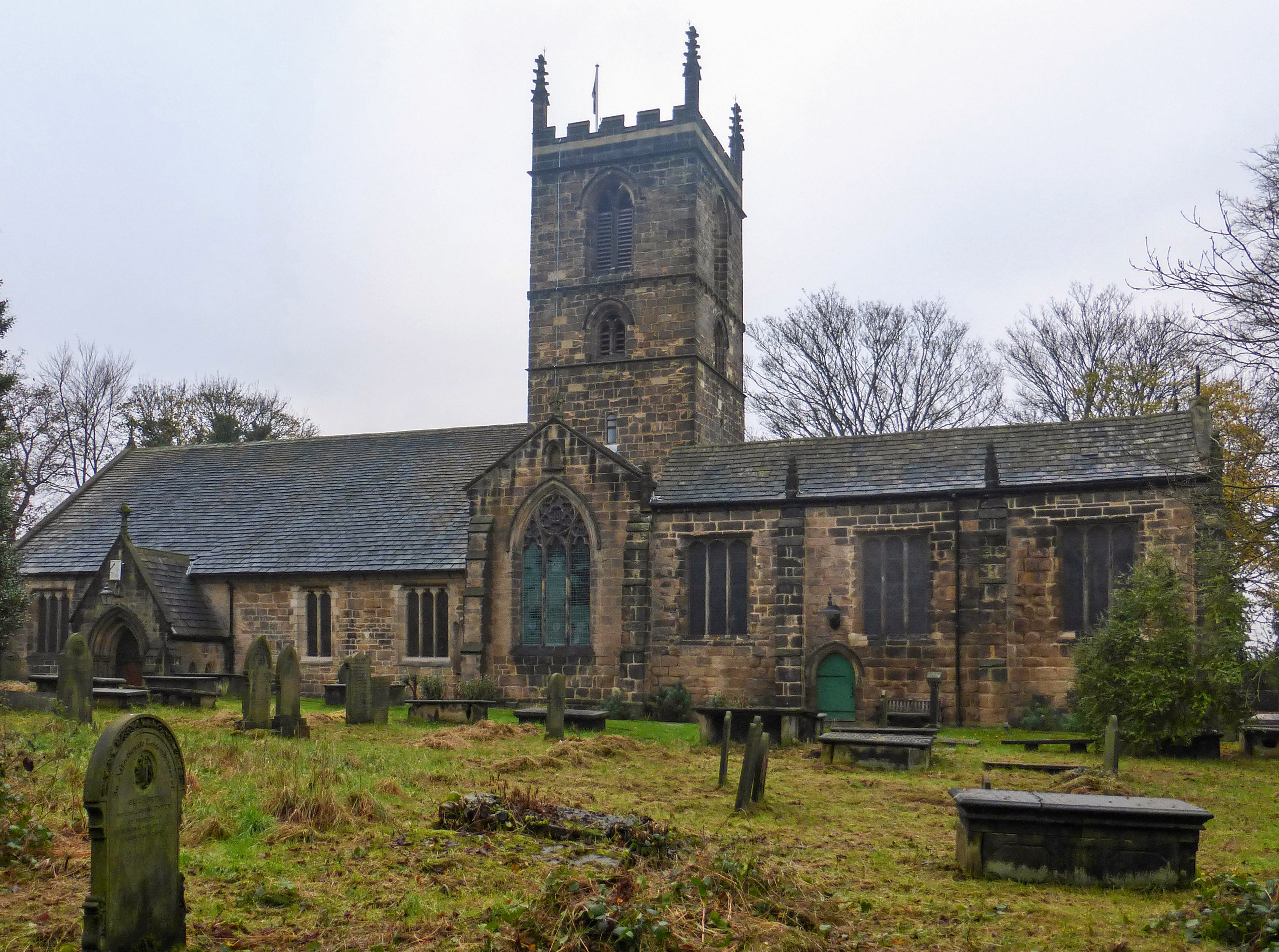 St Helen, Sandal Magna